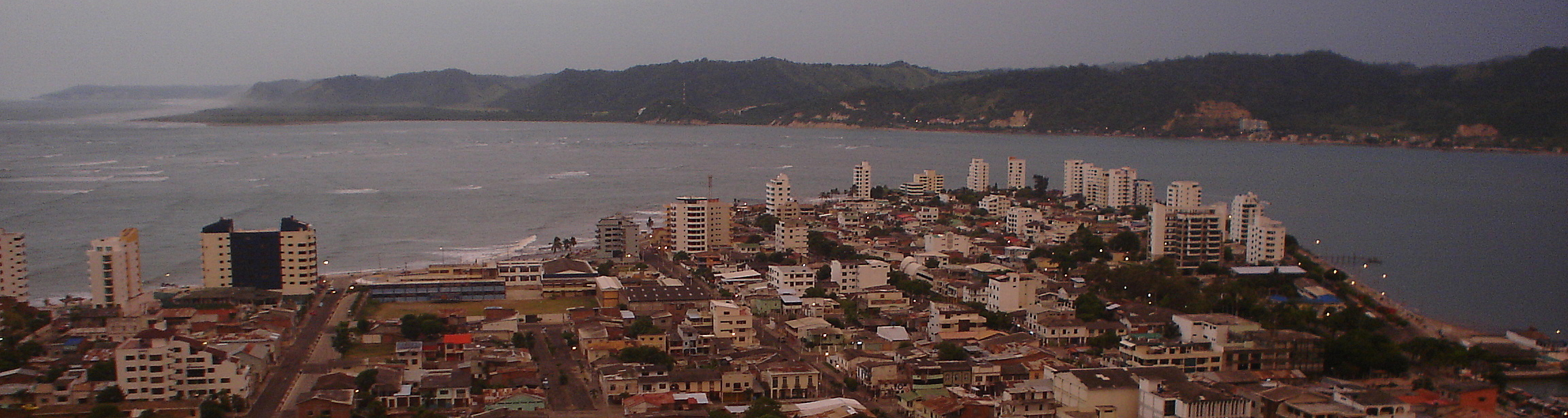 Bahía de Caráquez desde el mirador de La Cruz